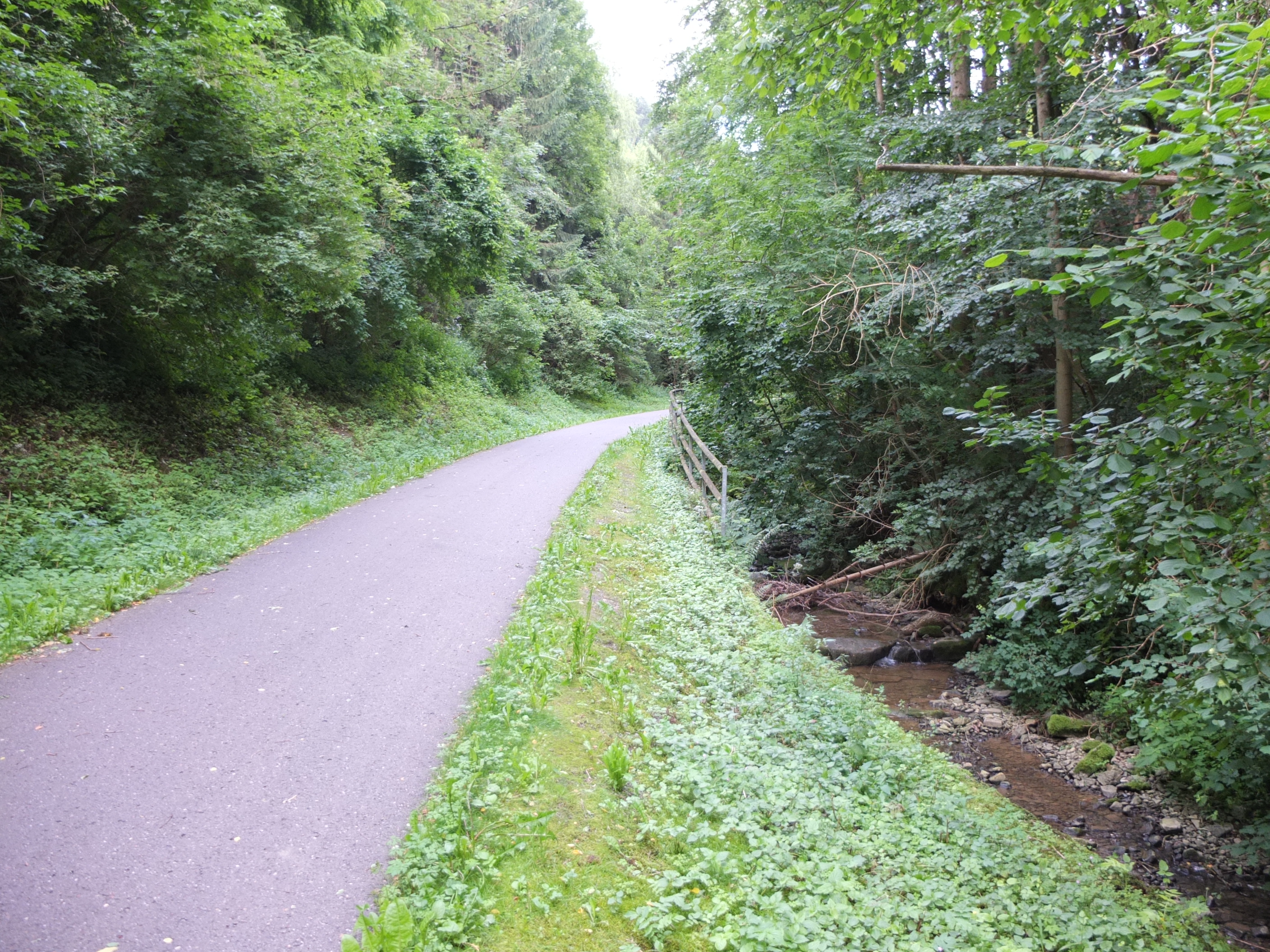 Rad- und Wanderweg auf der alten Bahntrasse der Kochertalbahn im Künsbachtal. Blick in Richtung Haag kurz nach Künzelsau.